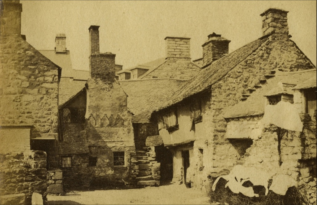 Senedd-dy Glyndŵr Dolgellau